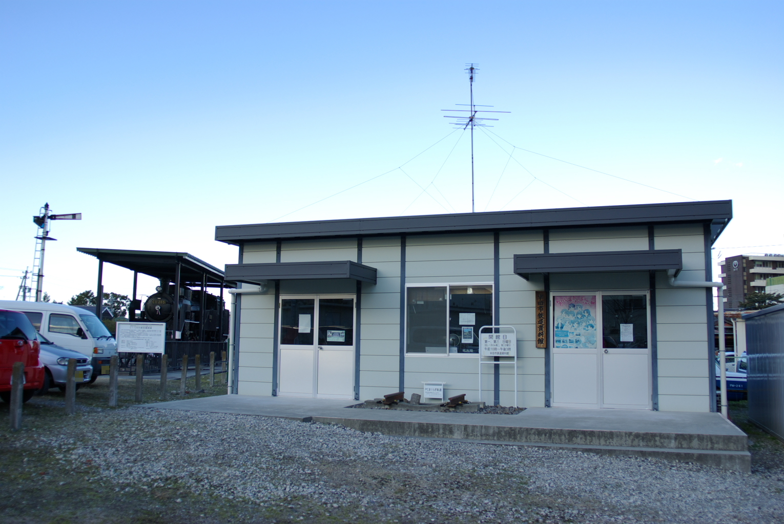 半田市鉄道資料館